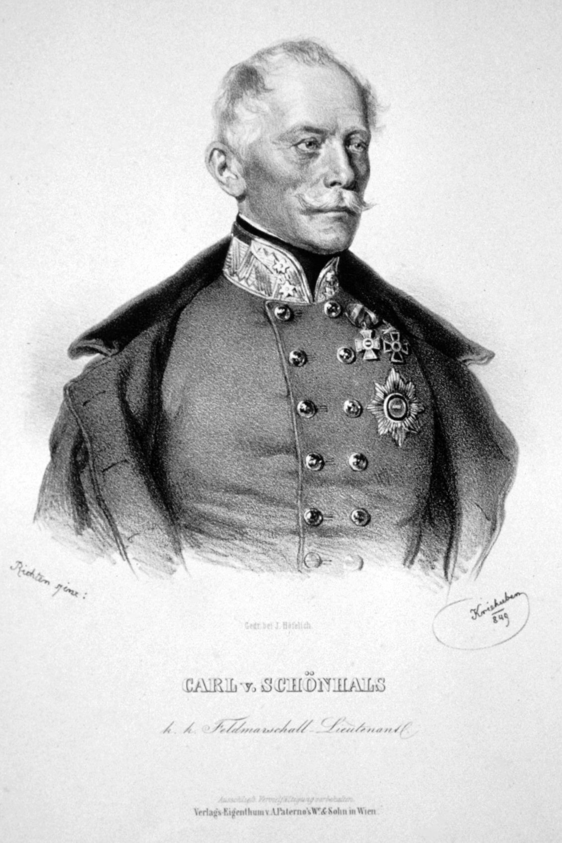 Carl von Schönhals (1788-1857), als Feldmarschallleutnant.